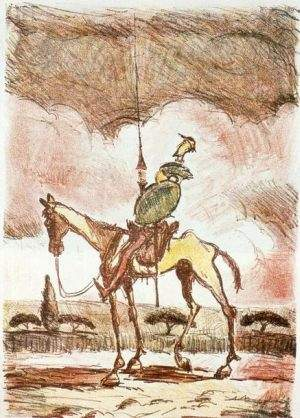 Don Quijote –1944- sign.: Majerník